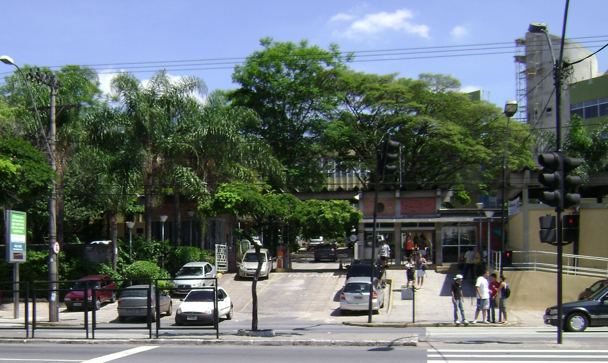 Entrada do Campus I do Centro Federal de Educação Tecnológica de Minas Gerais, em Belo Horizonte, Brasil.